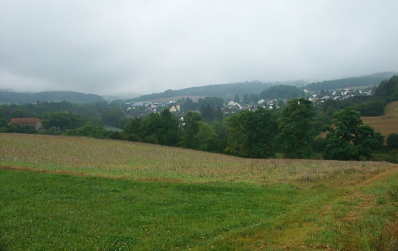 Gemeinde Cornberg im Tal des Cornberger Wassers